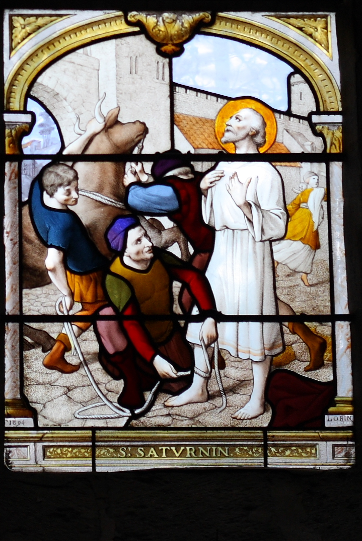 Bleiglasfenster (Ausschnitt) in der katholischen Pfarrkirche Église Saint-Aignan de Chartres in Chartres, Darstellung: Martyrium des Heiligen Saturnin, Signatur: "Lorin Maître verrier"